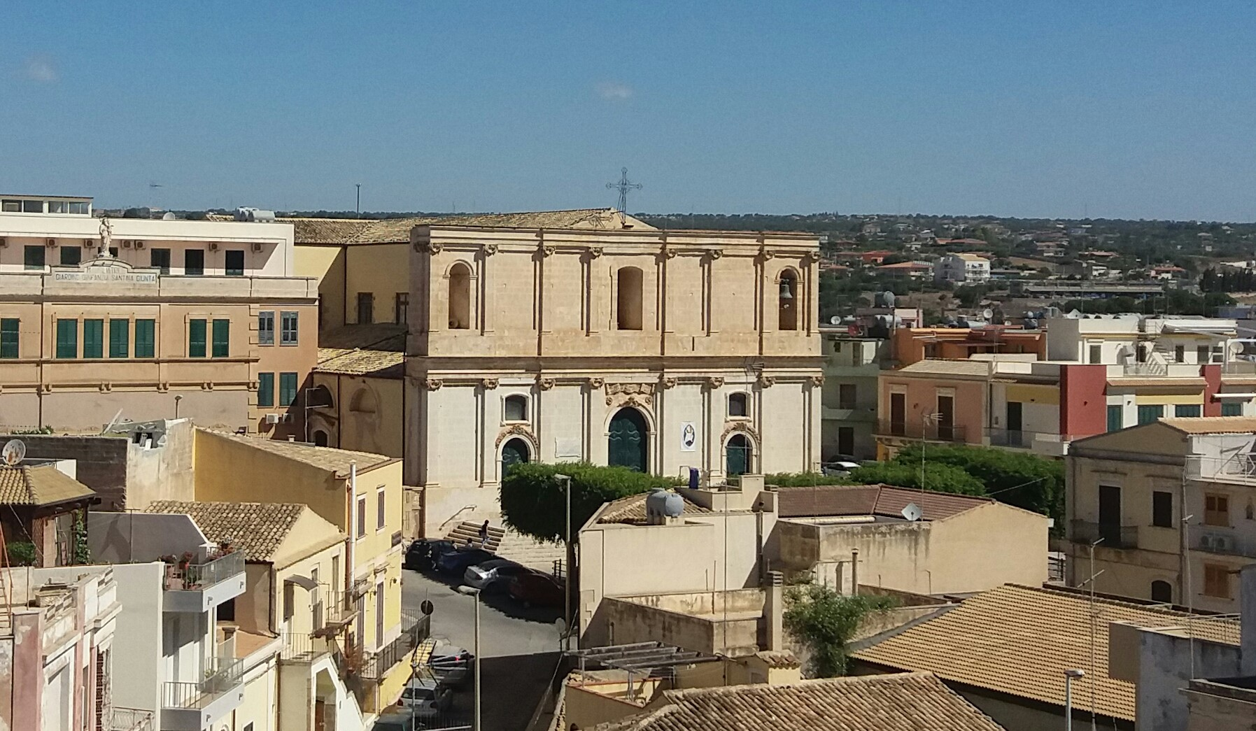 Chiesa Madonna del Rosario, Pozzallo